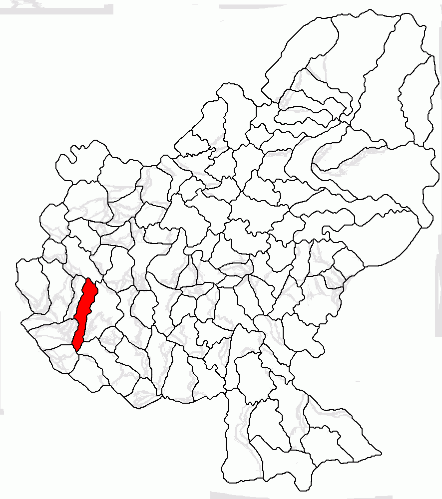 Categorie:Hărţi ale judeţului Mureş